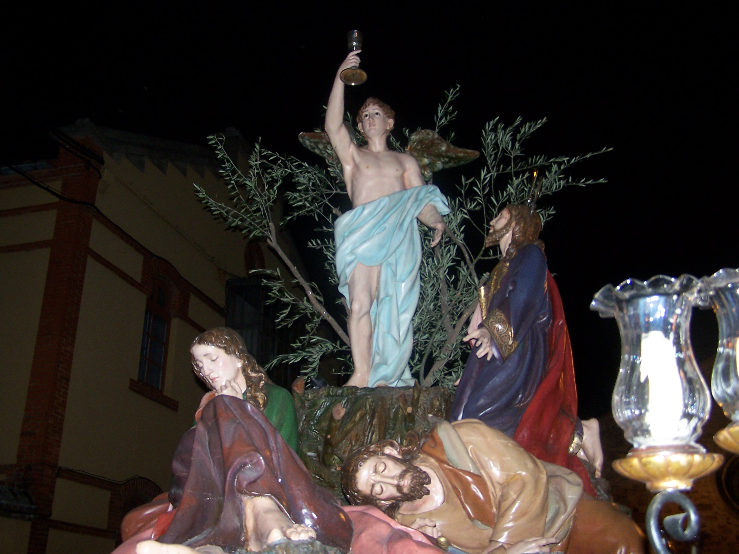 Paso de la Oración del Huerto, Miércoles Santo en Astorga (León, España).